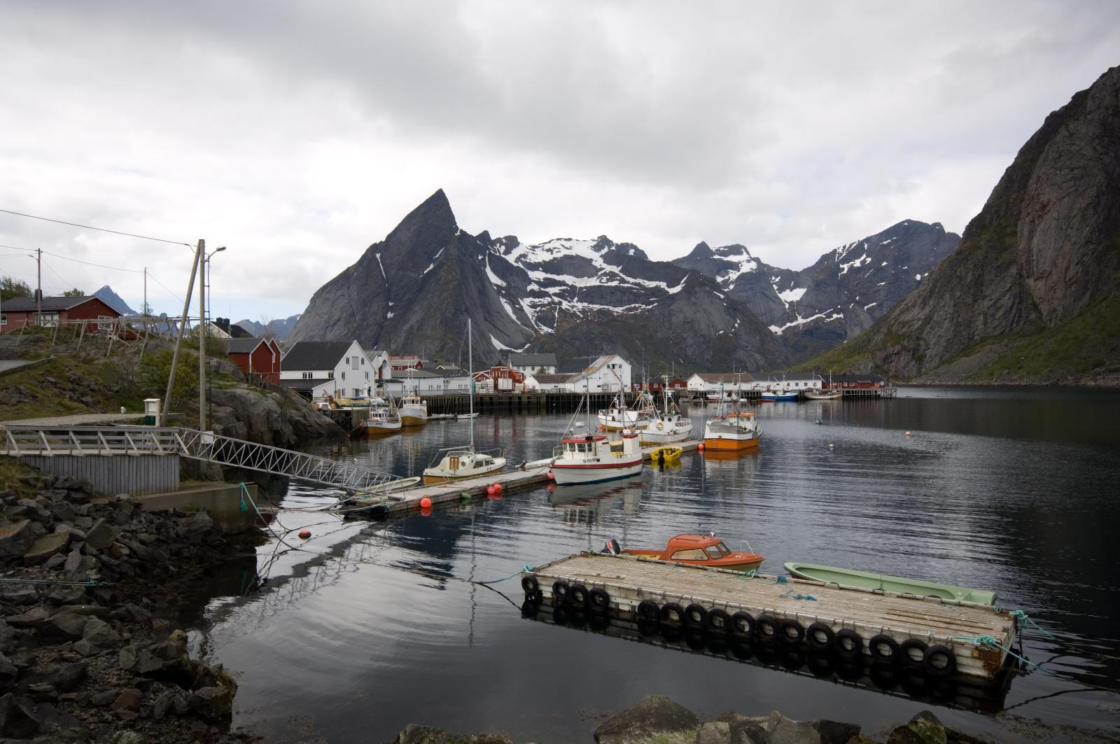 Hamnøy